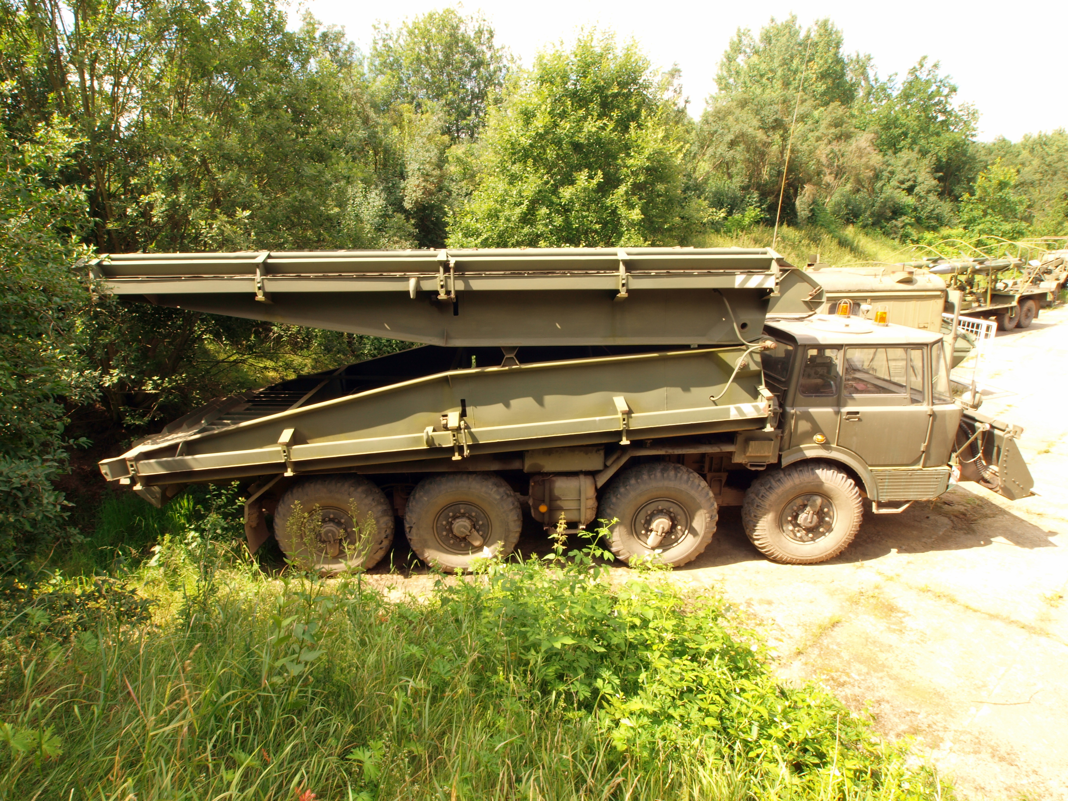 Mostní automobil AM-50.